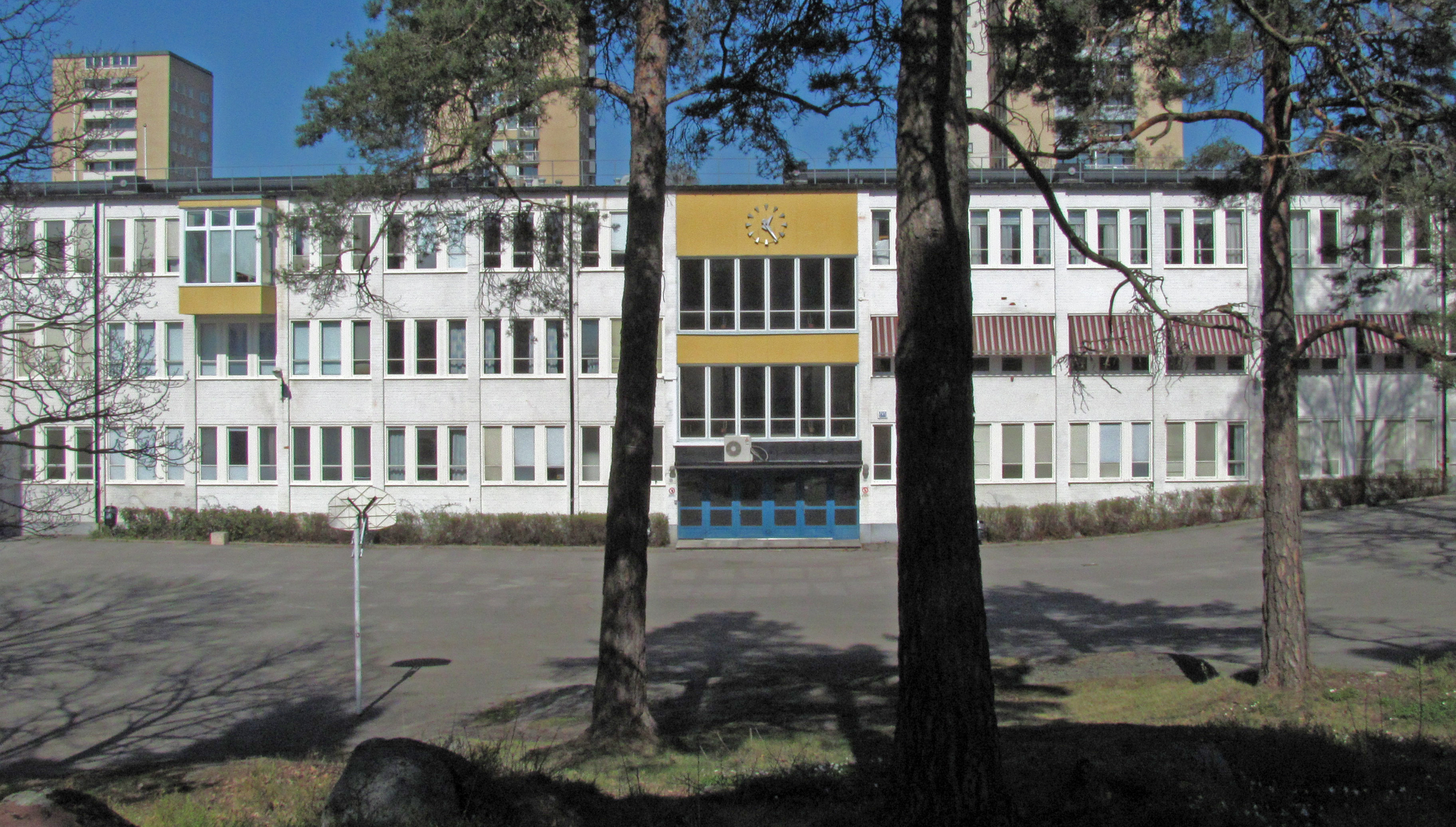 Farsta gymnasium, sydvästra fasaden